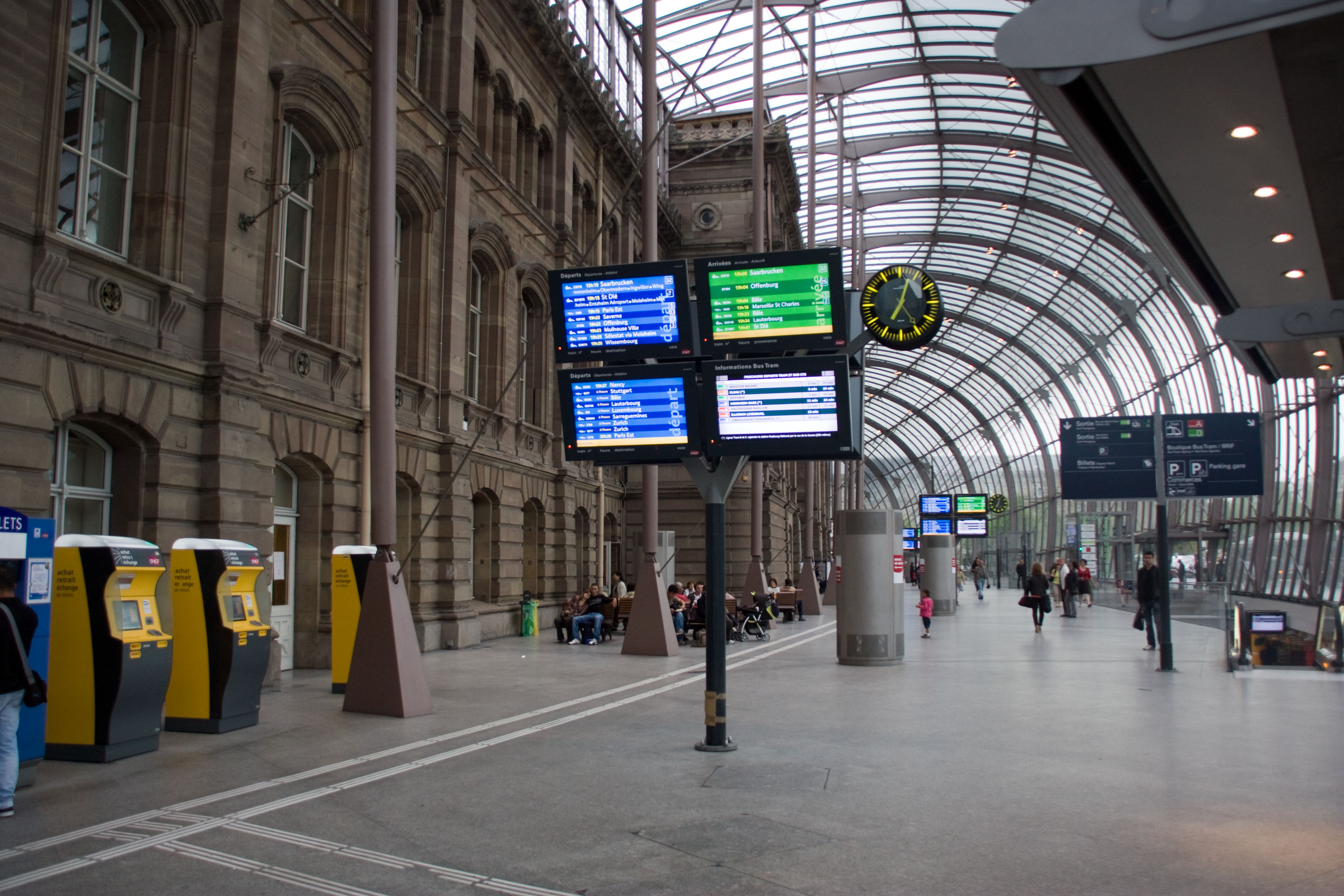 Gare de Strasbourg, Strasbourg, Bas Rhin.